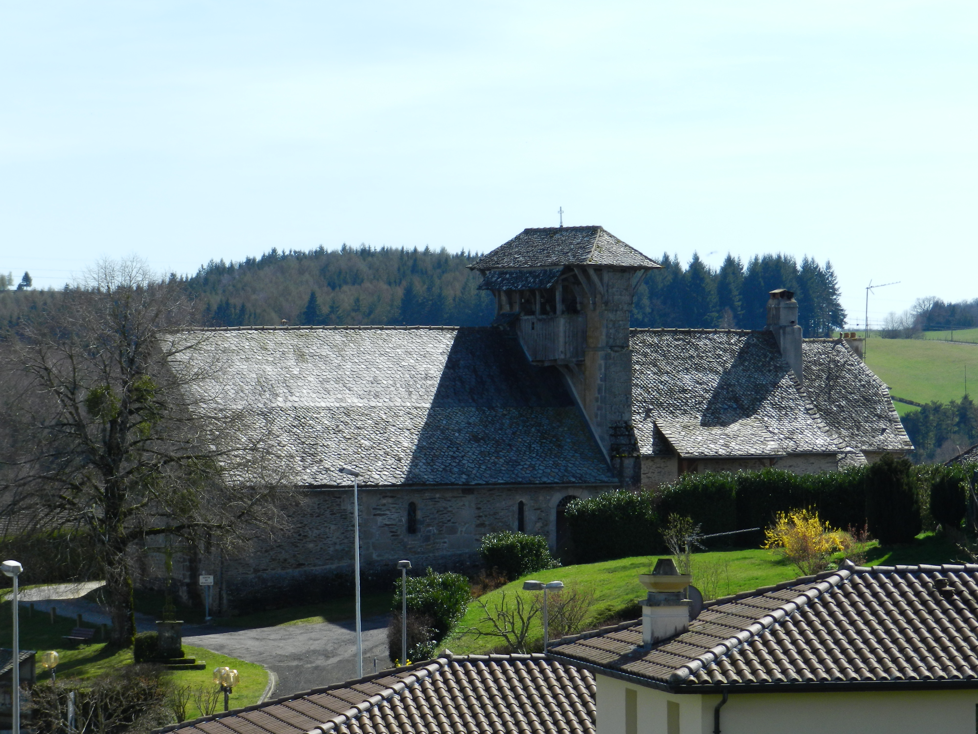 Vue sur l'église de Prunet depuis le lotissement Delhostal